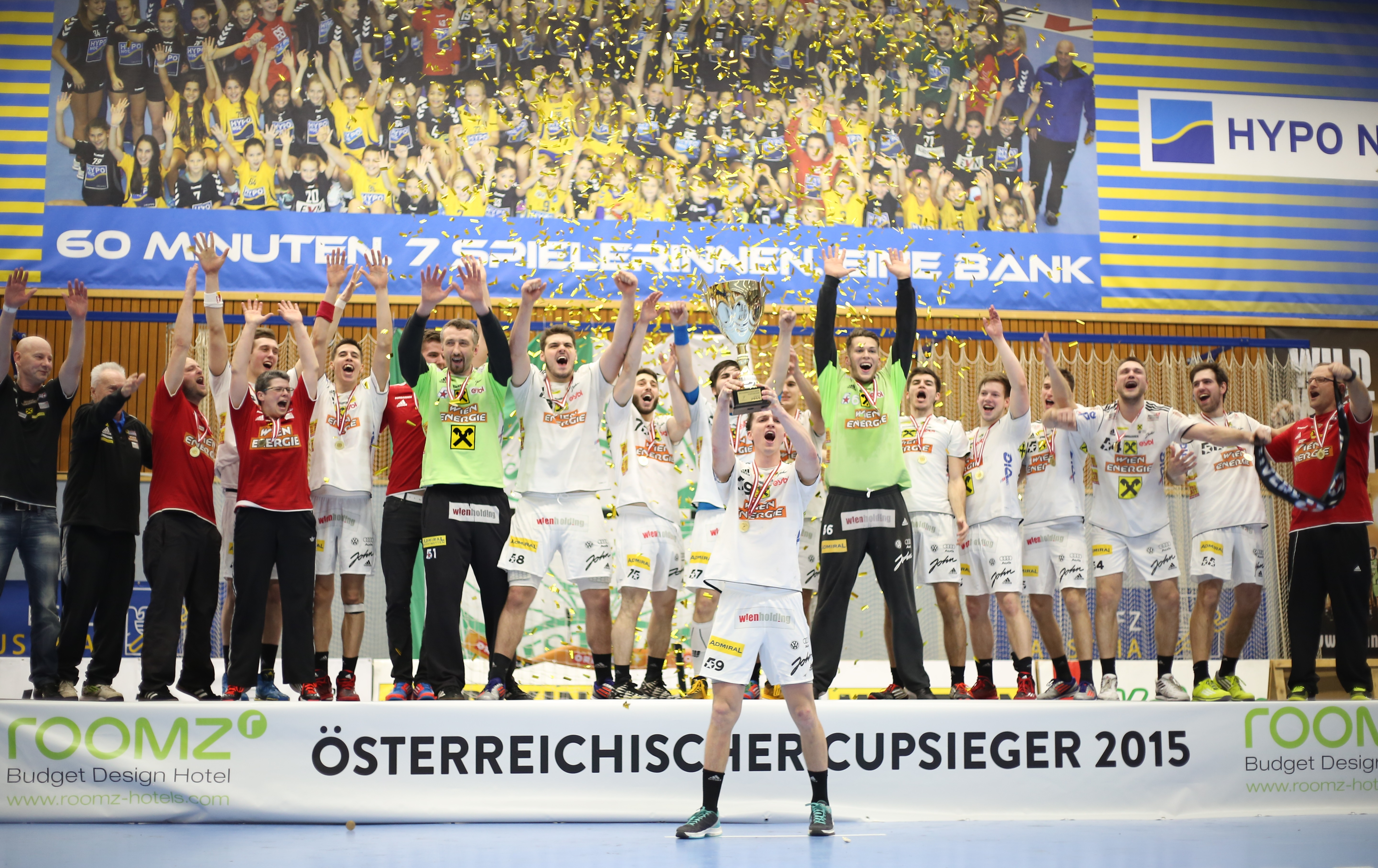 Feier nach dem ÖHB-Cup-Sieg des Handballclubs Fivers Margareten